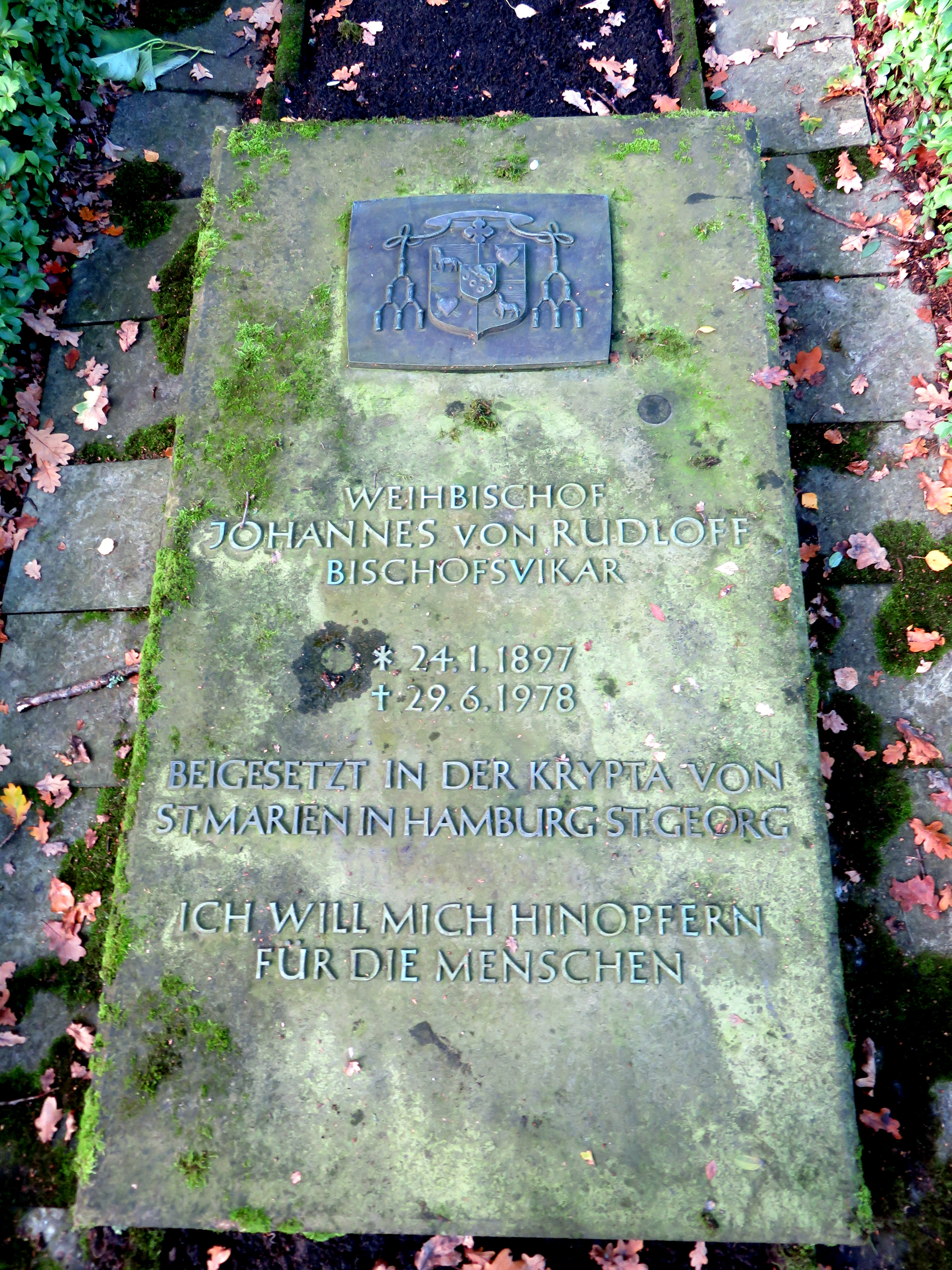 Gedenkplatte für Weihbischof Johannes von Rudloff mit Relief von Egino Weinert im Bereich mit Grabplatten leitender Hamburger Geistlicher sowie den vier letzten Stationen des Kreuzweges, Friedhof Ohlsdorf, Planquadrat Bm 70 (südlich Kapelle 13), zentrale Stele mit Kruzifix von 1886 des ehemaligen Hamburger Friedhofs Karolinenstraße. Beigesetzt wurde Johannes von Rudloff in der Krypta des Hamburger St. Marien-Doms.